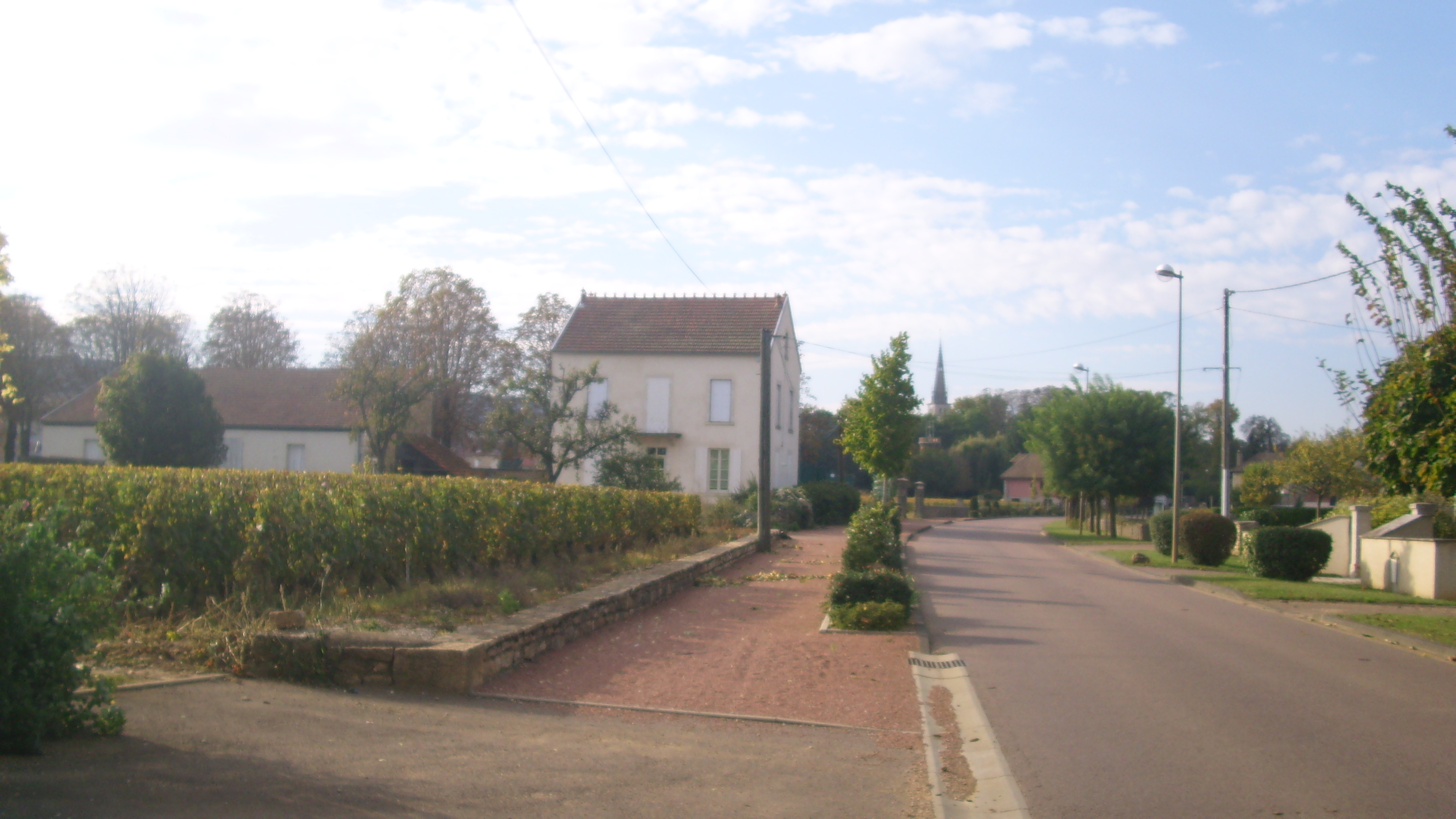 Une des rues de Meursault (21)